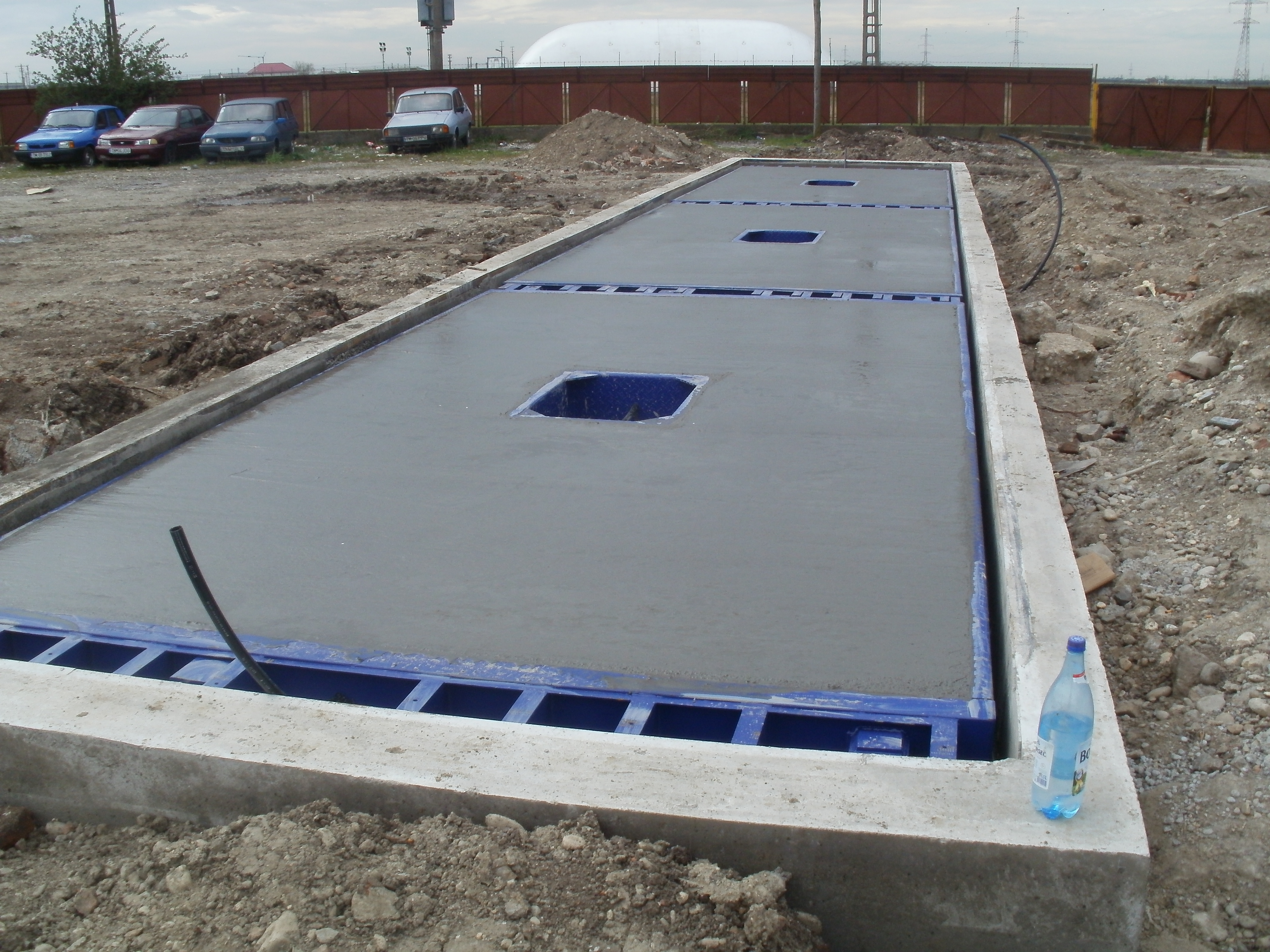 Turnare cantar auto beton